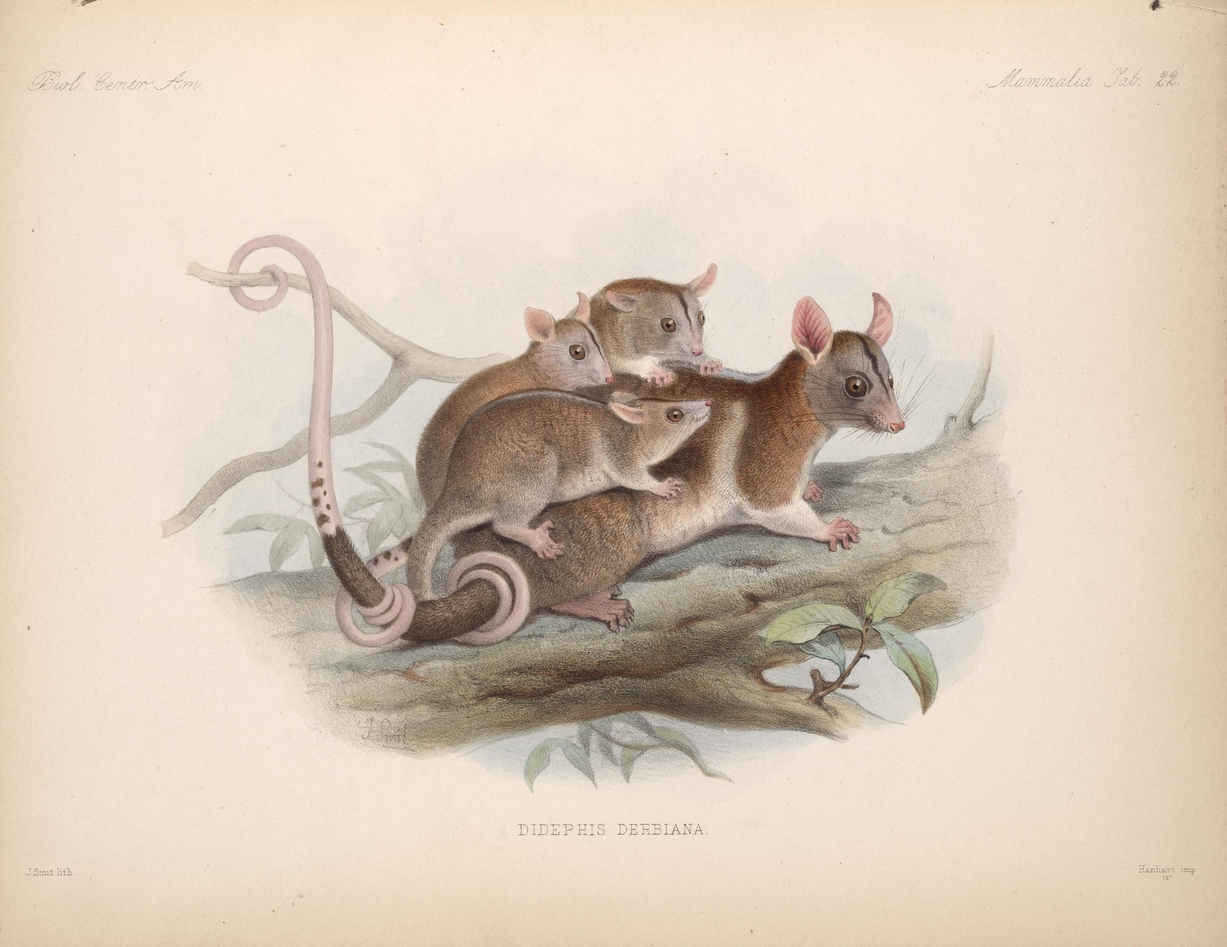 ■^ KM 9 n '# I .jOB